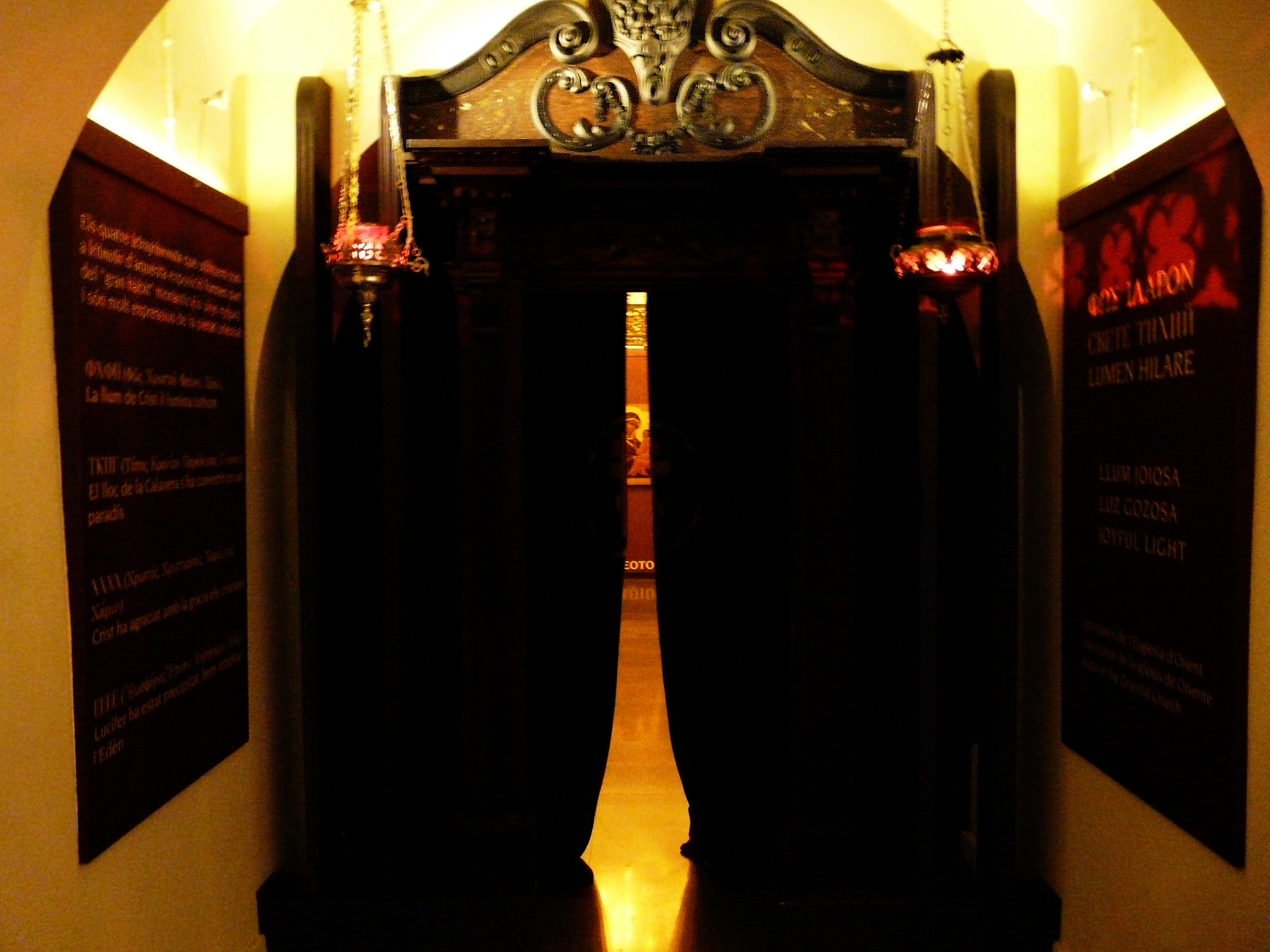 "Свете тихий"